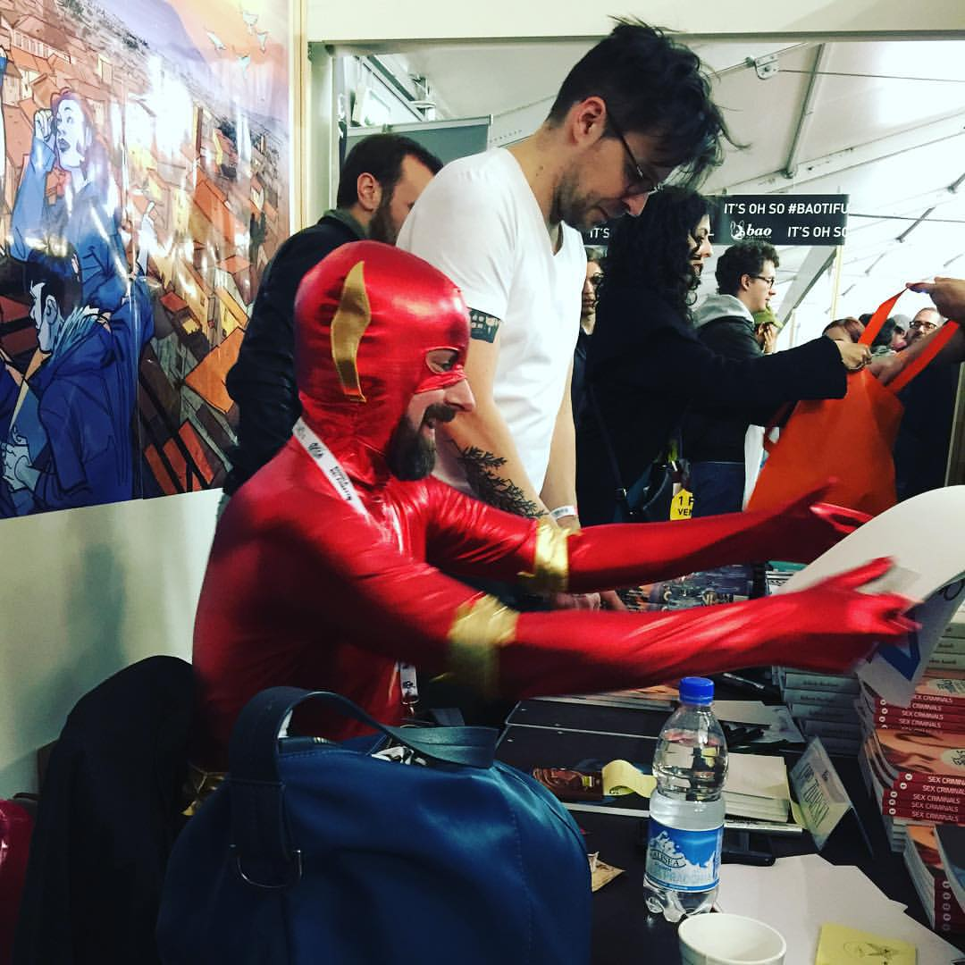 Chip @zdarsky